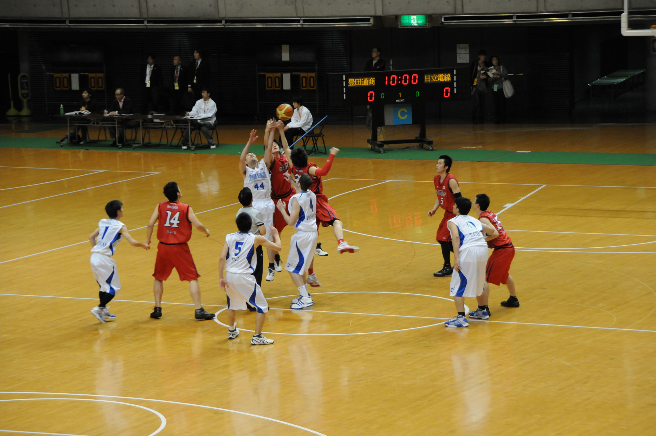 2010年全日本総合バスケットボール選手権大会2回戦、豊田通商ファイティングイーグルス対日立電線ブルドックス。東京体育館で。